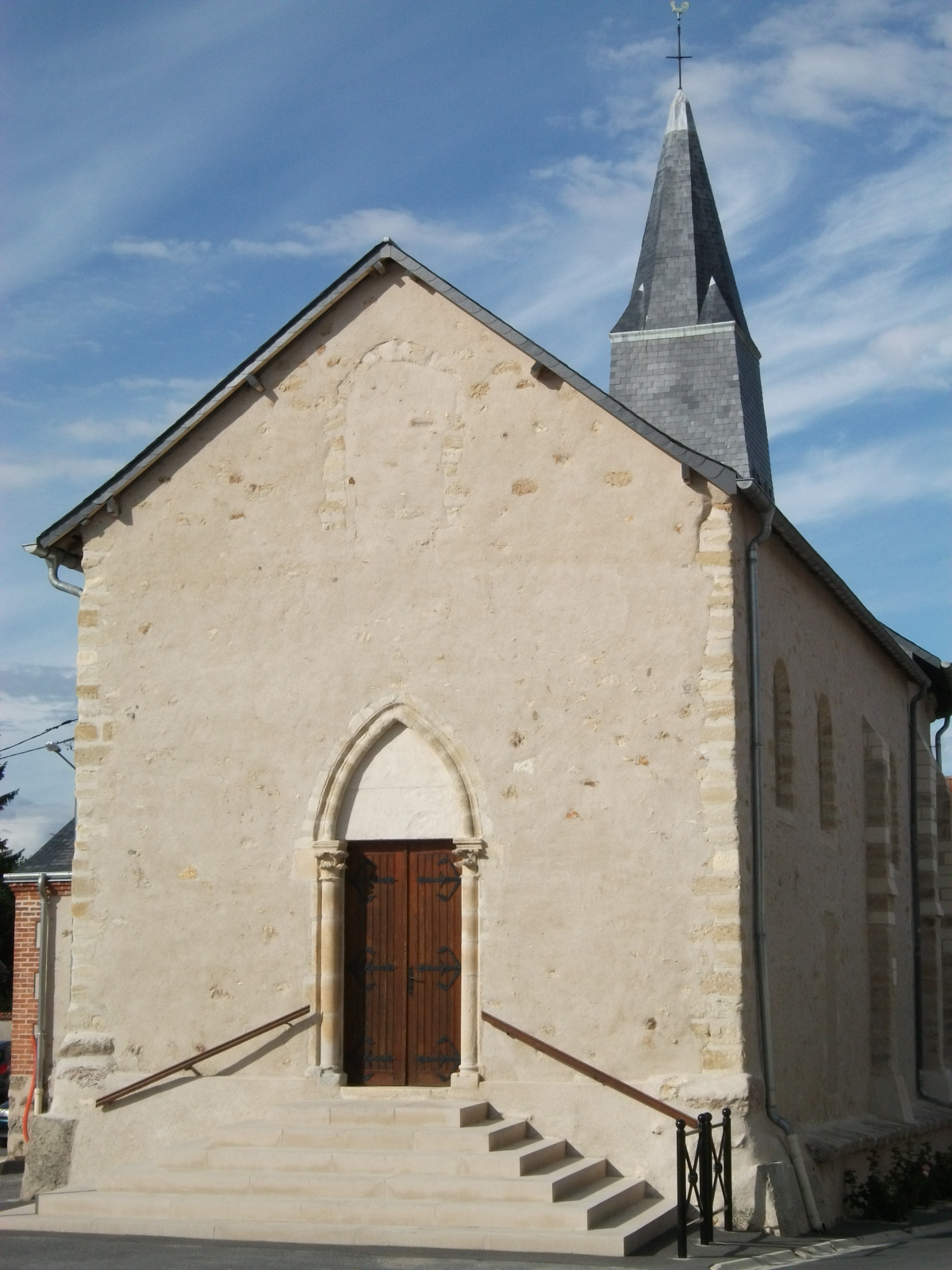 porche d'entrée de l'église St-Etienne de Trois-Puits.